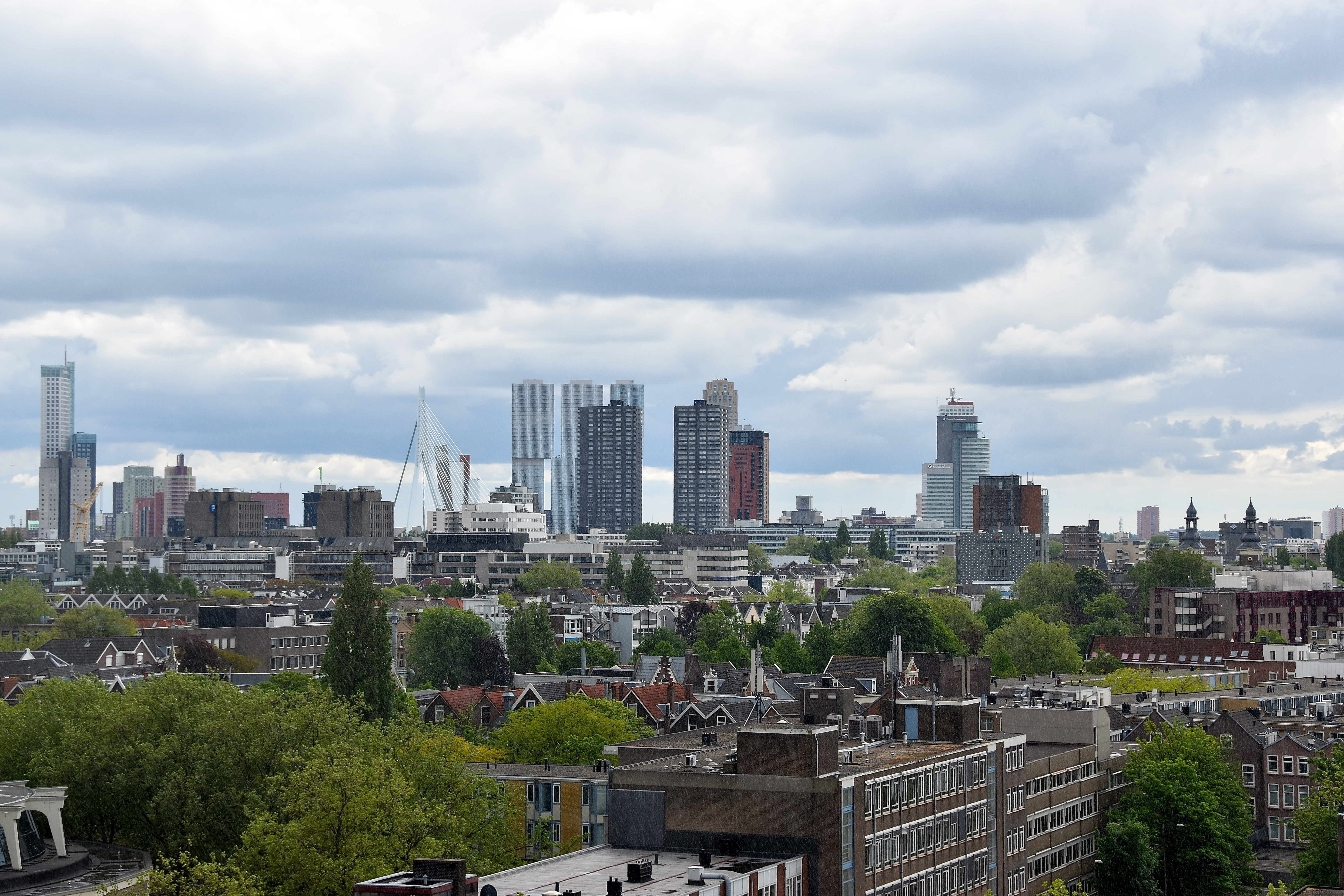 Op het plein voor het Centraal Station van Rotterdam is vandaag de trap naar het groothandelsgebouw geopend door burgemeester Aboutaleb. De trap is 29m hoog, telt 180 treden en is 60 ton zwaar. Hij is (gratis) te beklimmen tot 12 juni 2016. De trap voert naar het terras van het Groothandelsgebouw waar een looproute is aangelegd zodat je vanuit elke hoek naar de stad kunt kijken. Op de achtergrond o.a. de Erasmusbrug en De Rotterdam.